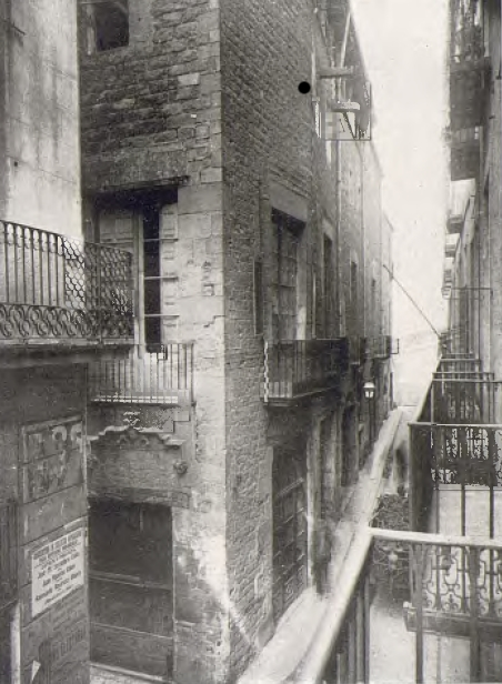 Casa Padellàs a la seva ubicació original al carrer Mercaders número 25. Durant el període 1930-1931, es va haver de traslladar pedra a pedra a la plaça Rei de Barcelona a causa de l'obertura de la Via Laietana.